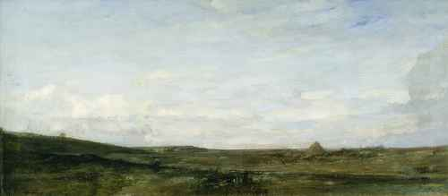 Nelle pianure di Ardea, ol/tl, 48 x 128,5 Coll. privata